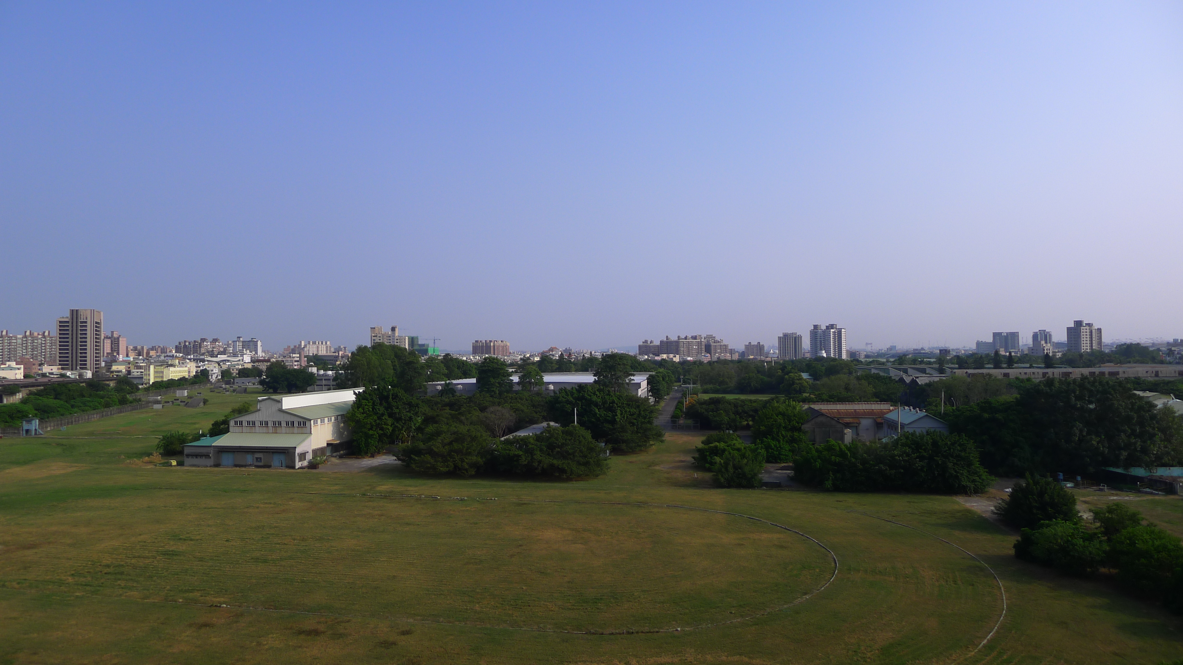 中文（台灣）: 國防部軍備局生產製造中心第205廠前鎮廠區，位於臺灣高雄市前鎮區。